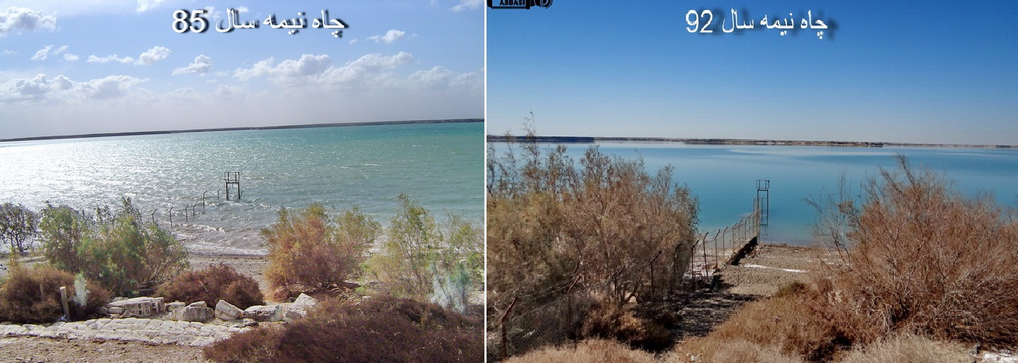 مقایسه حجم آب درسالهای مختلف